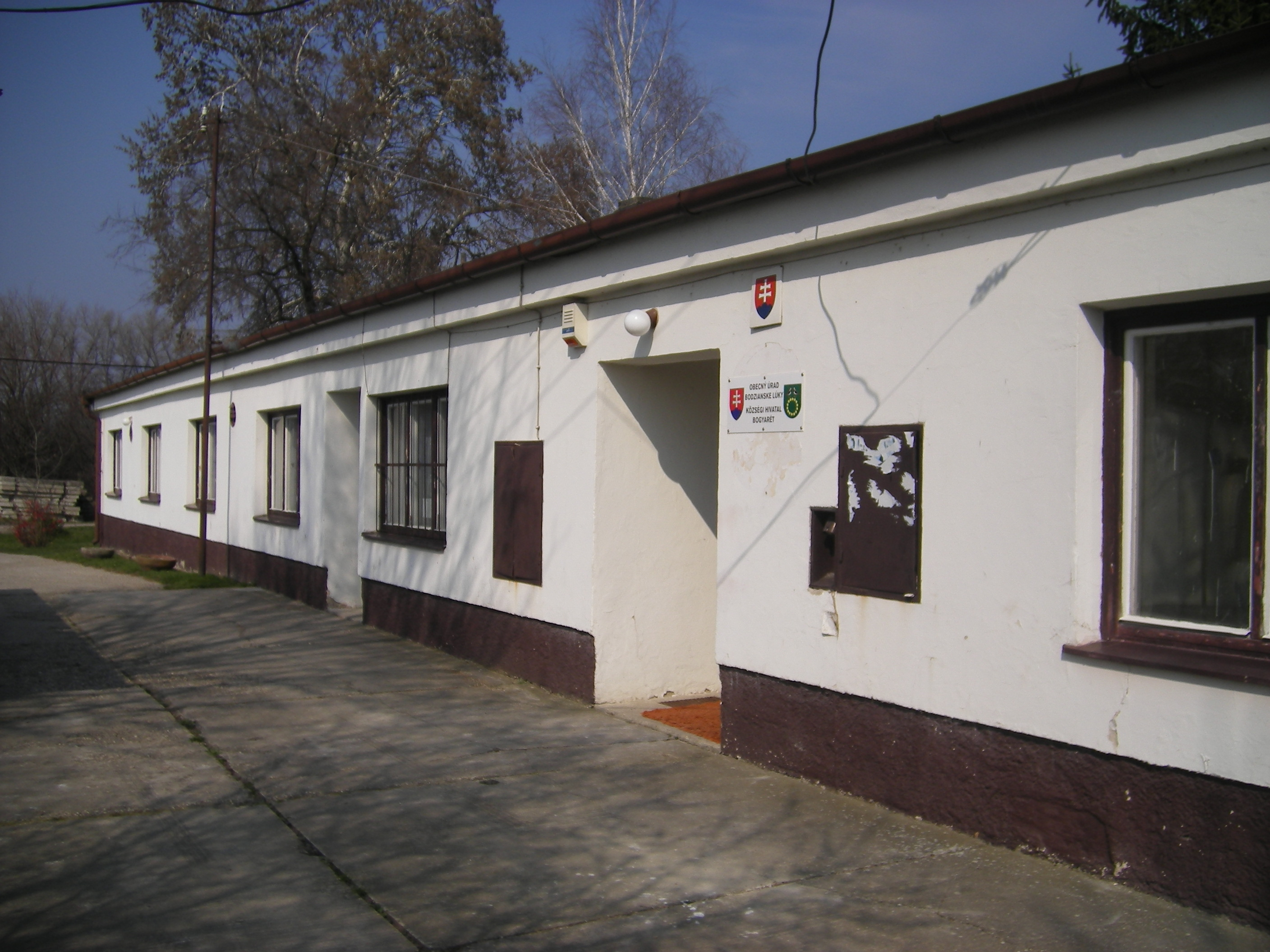 Bogyarét - községház